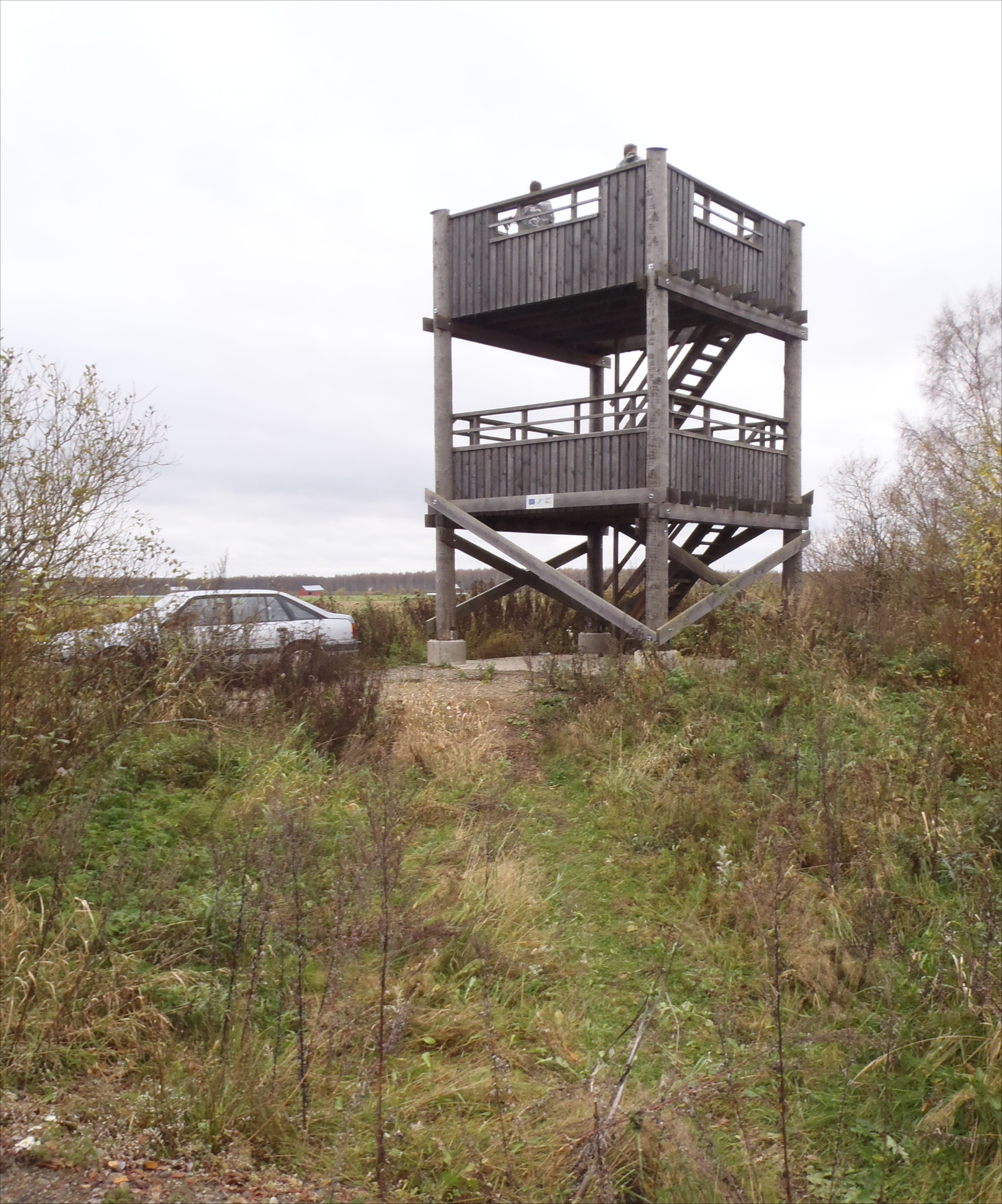 Raijalanjärvi lintutorni Huittinen Kokemäenjoki